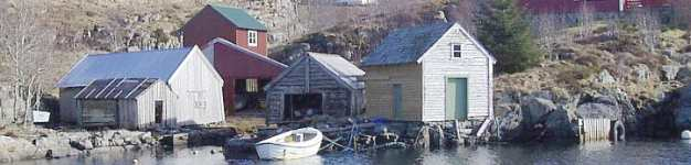 Breivik i Øygarden